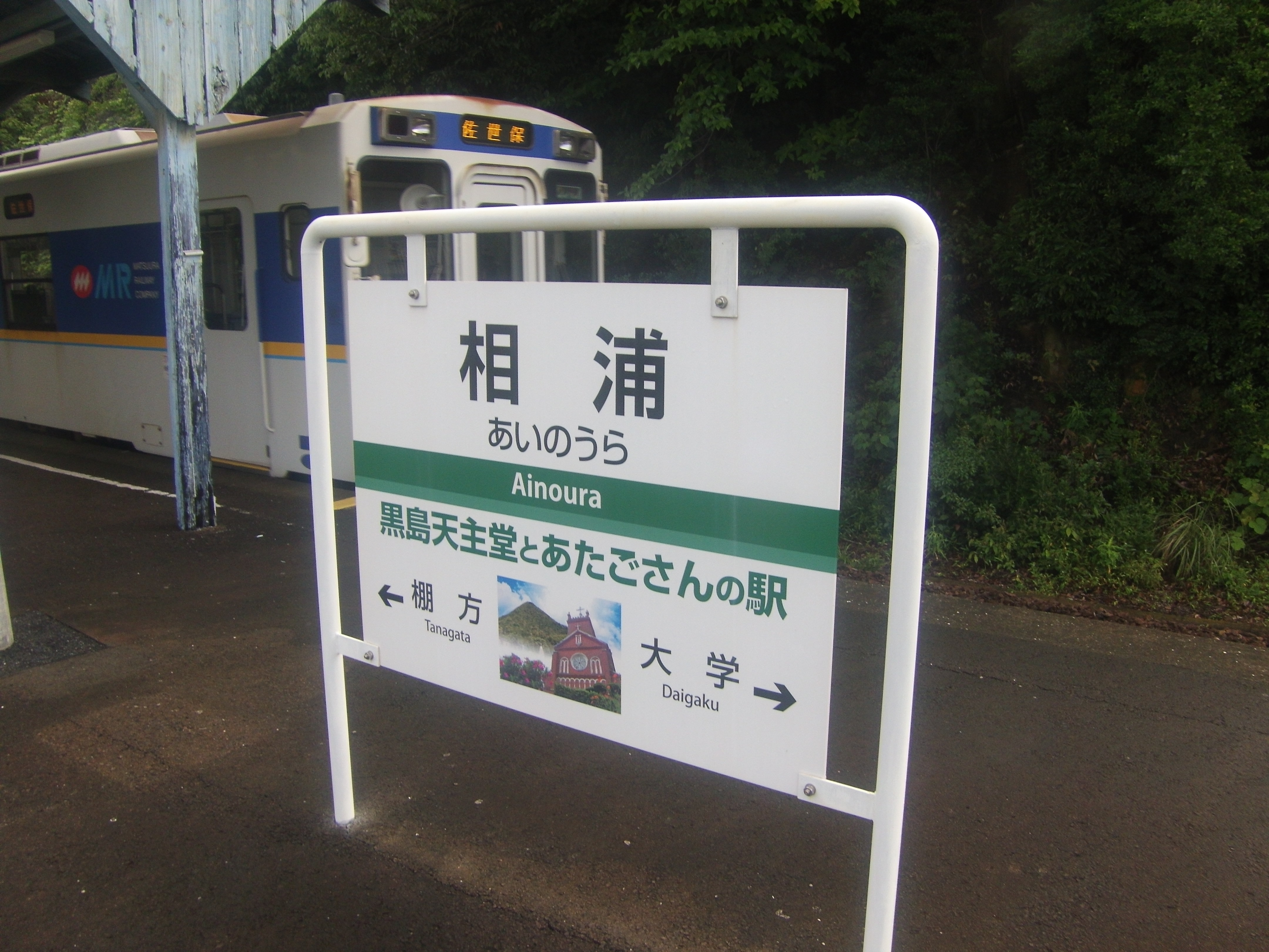 松浦鉄道相浦駅の愛称が併記された新しい駅名標